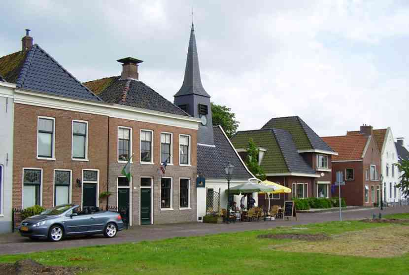 Foto met daarop de Hoofdwacht genomen in Bad Nieuweschans door Marco Roepers op 3 juli 2005